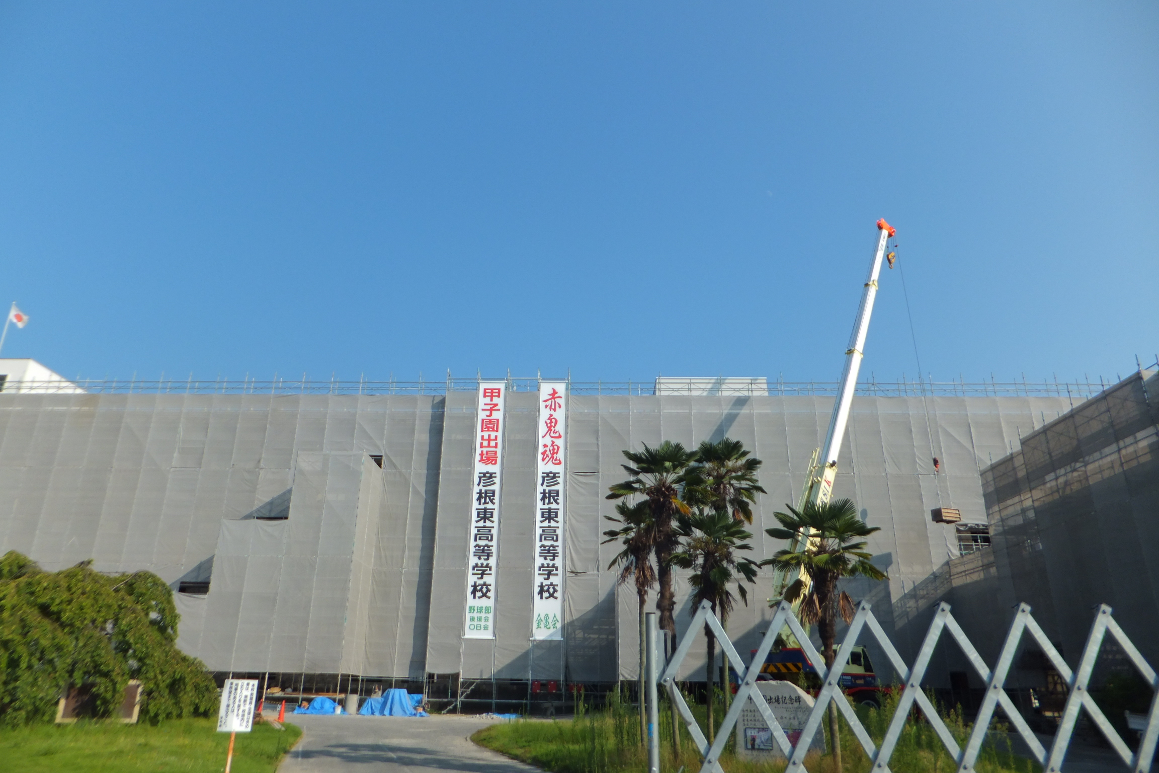 滋賀県立彦根東高等学校